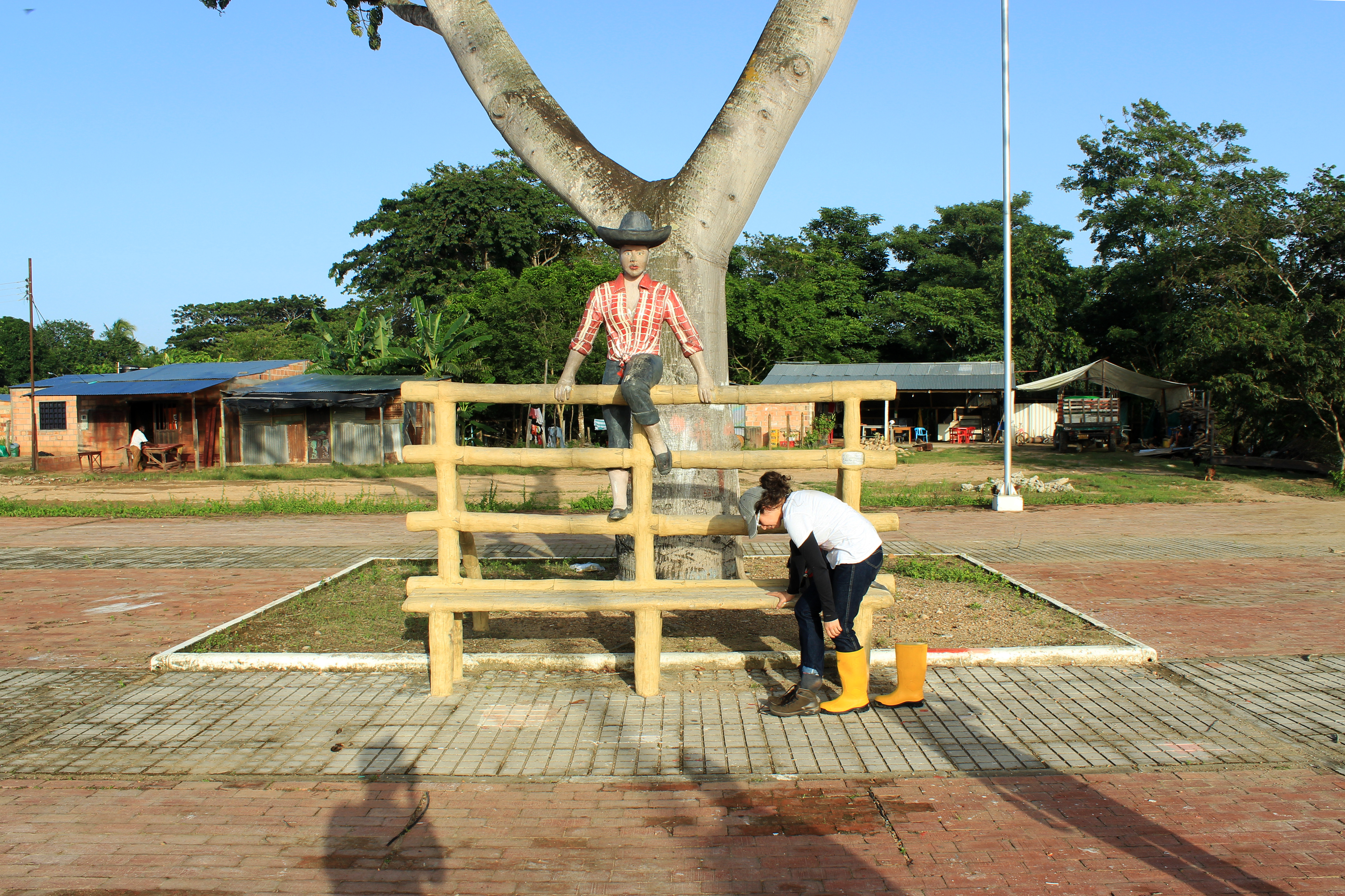 Monumento en honor a las llaneras casanareñas, ubicado en Maní, Casanare